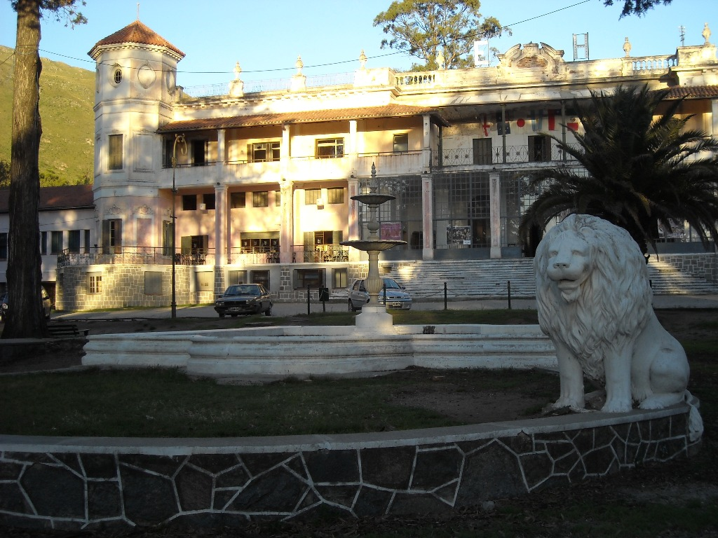 Fachada del Eden Hotel. En primer plano se observa la fuente y uno de los leones que la adornar.